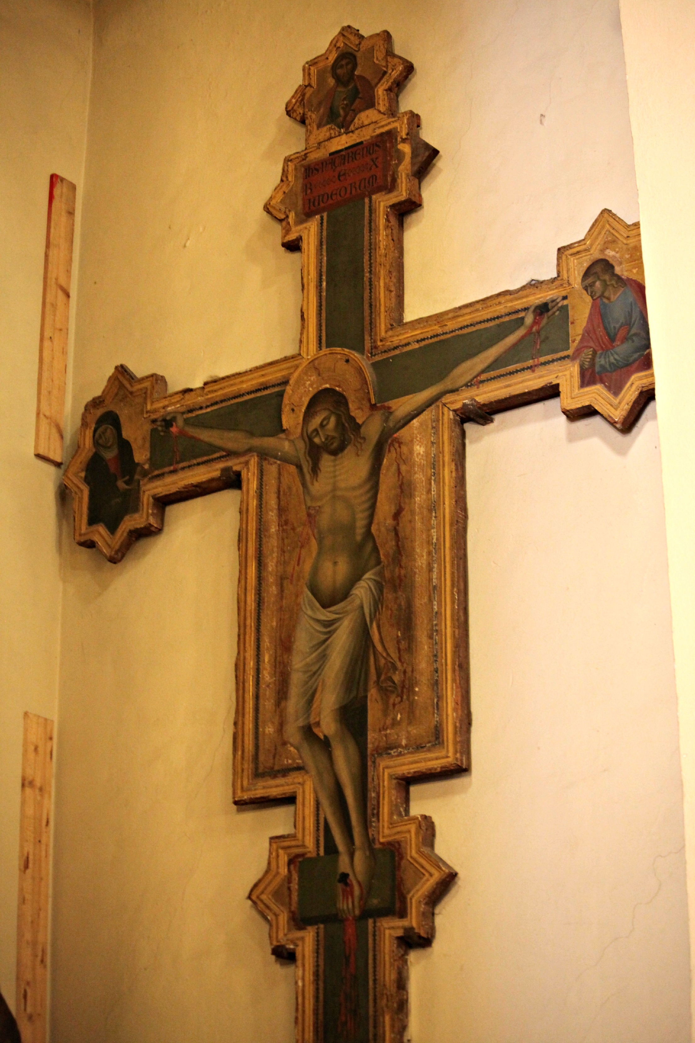 Croce dipinta di Luca di Tommè (3 cappella a sinistra)